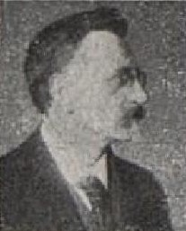 Franz Krejčí (1878-1973), československý politik německé národnosti